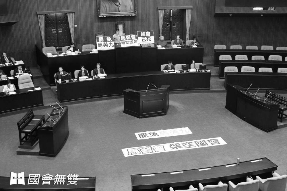 立法院院會因為馬習會而遭到杯葛